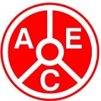 Escudo